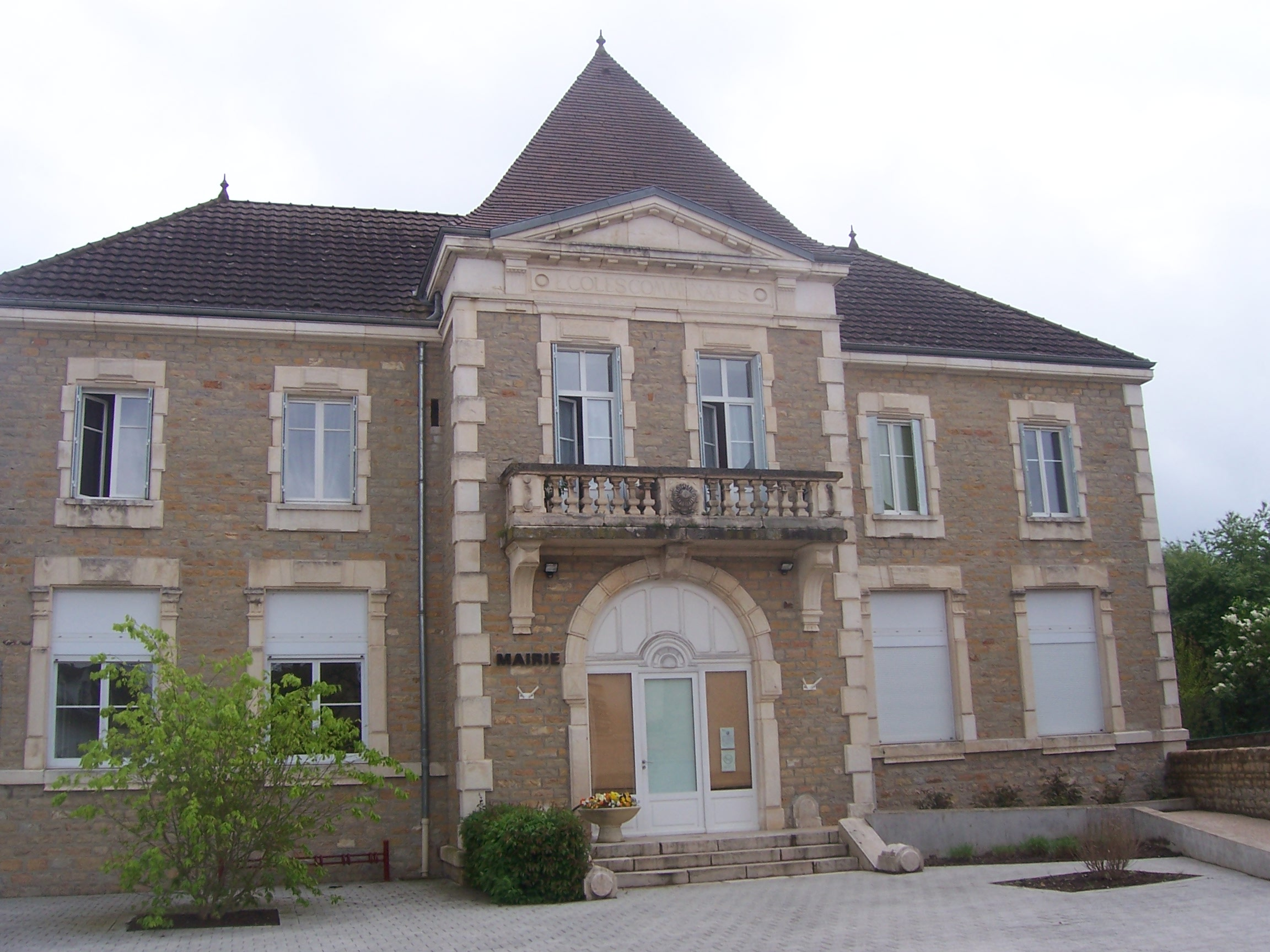 Mairie de La Charmée